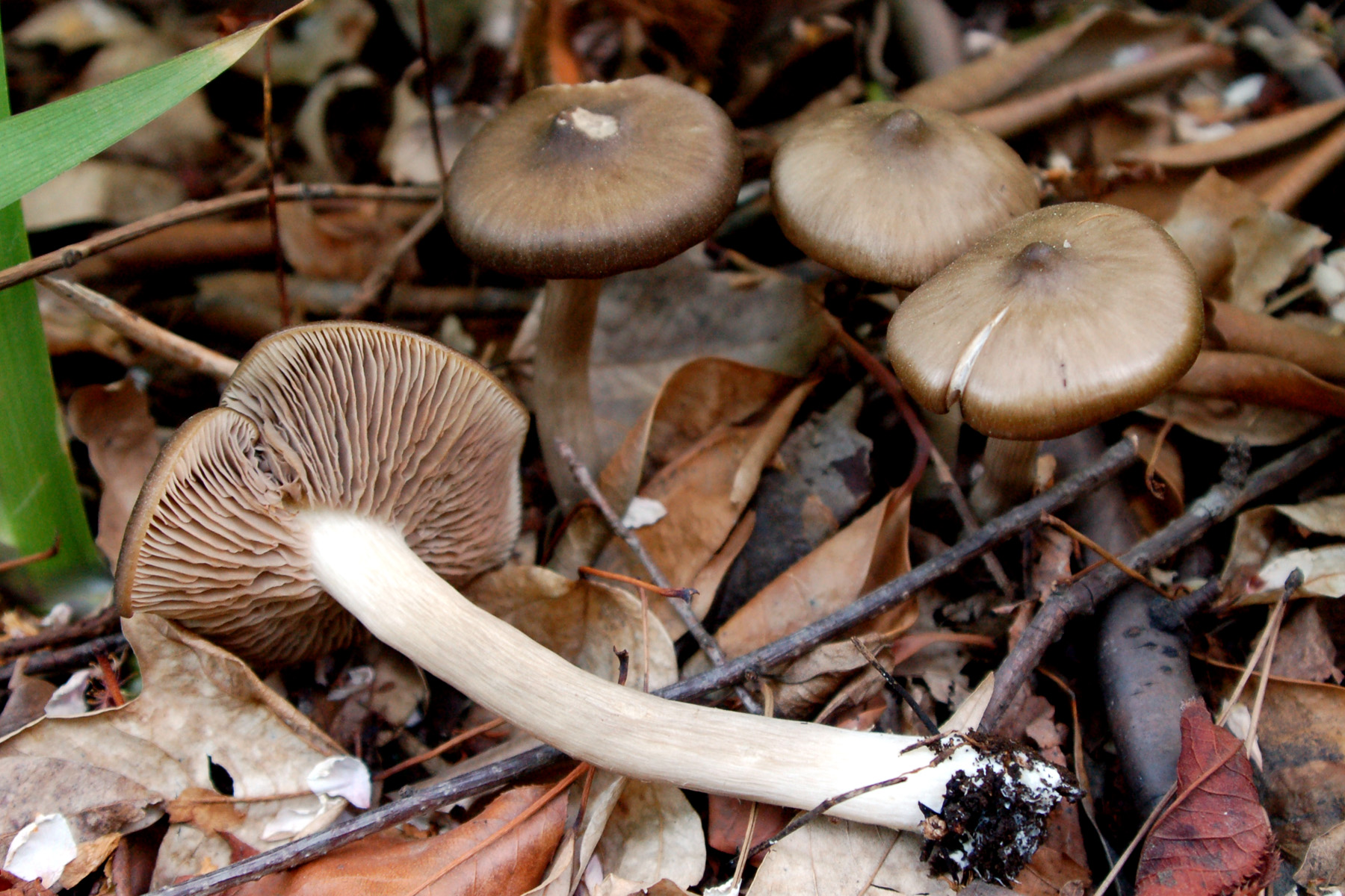 Entoloma sp., under cherry tree in spring. Entoloma sp.(広義の「ハルシメジ」。)桜の樹下に発生したもの。ひだが成熟すると暗桃色になるという、同属の典型的な特徴を示す。